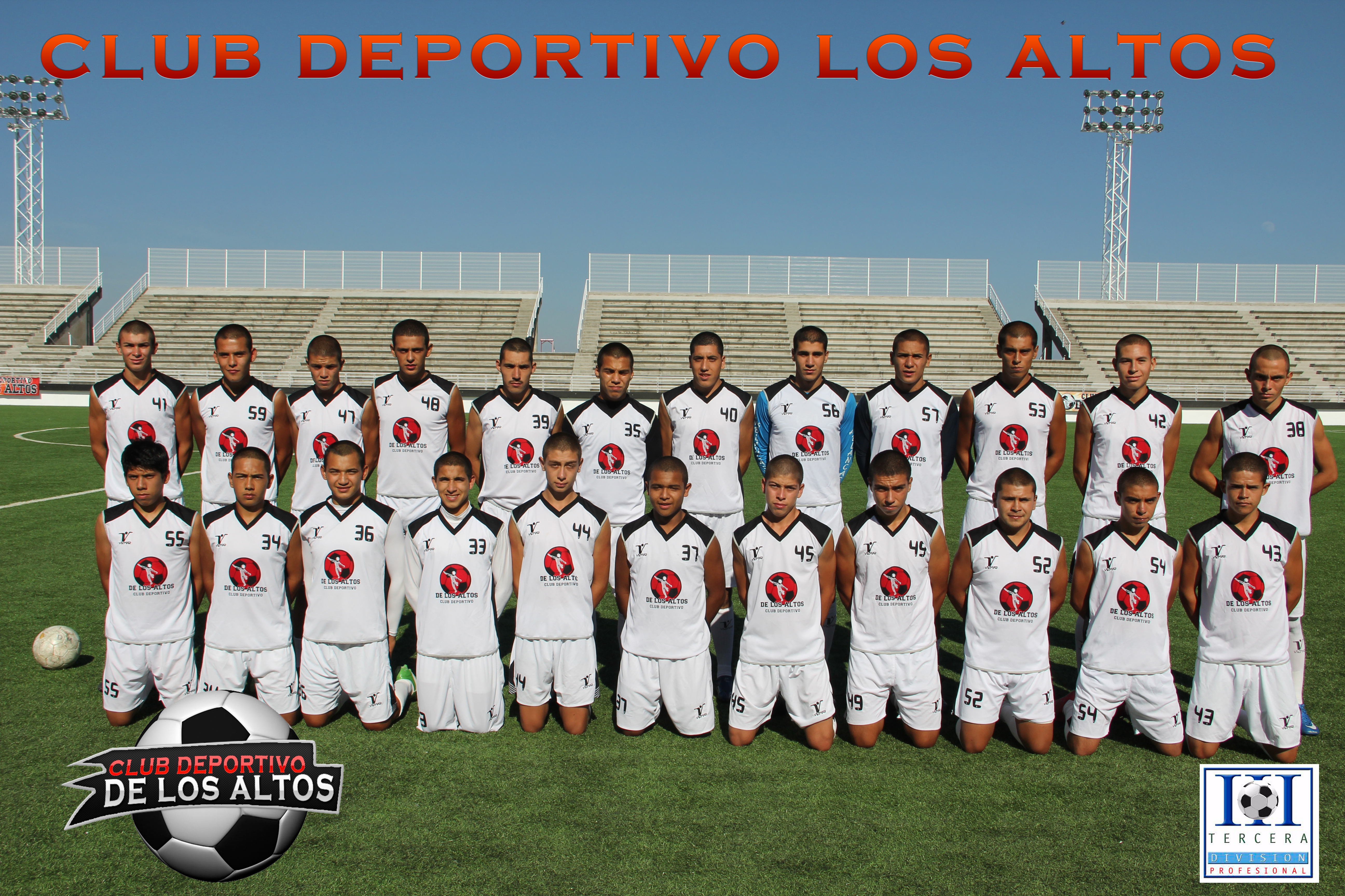 Jugadores de tercera Division